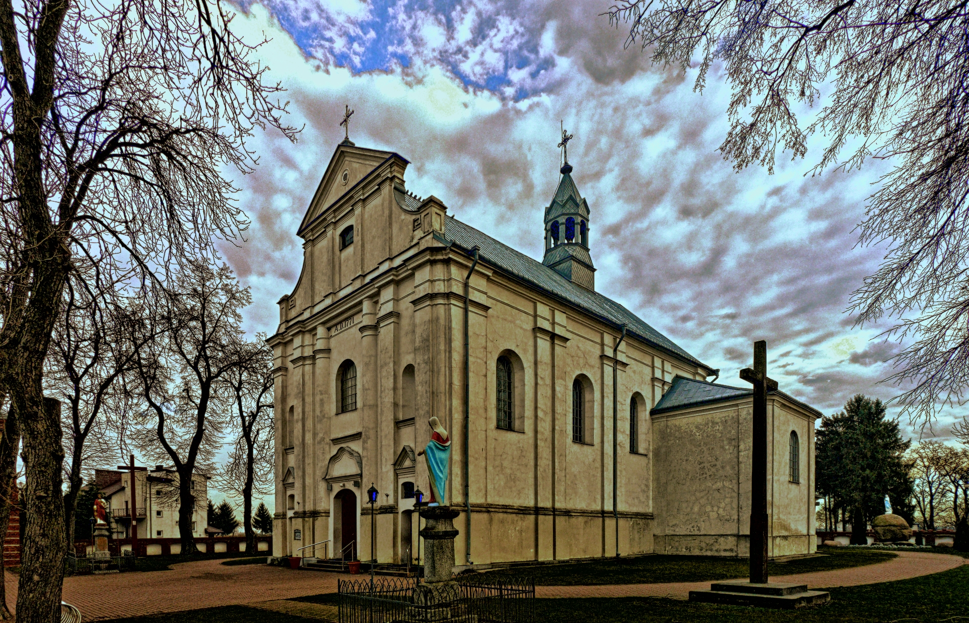 kosciół p.w. św. Małgorzaty w Ulanie-Majoracie, woj. lubelskie